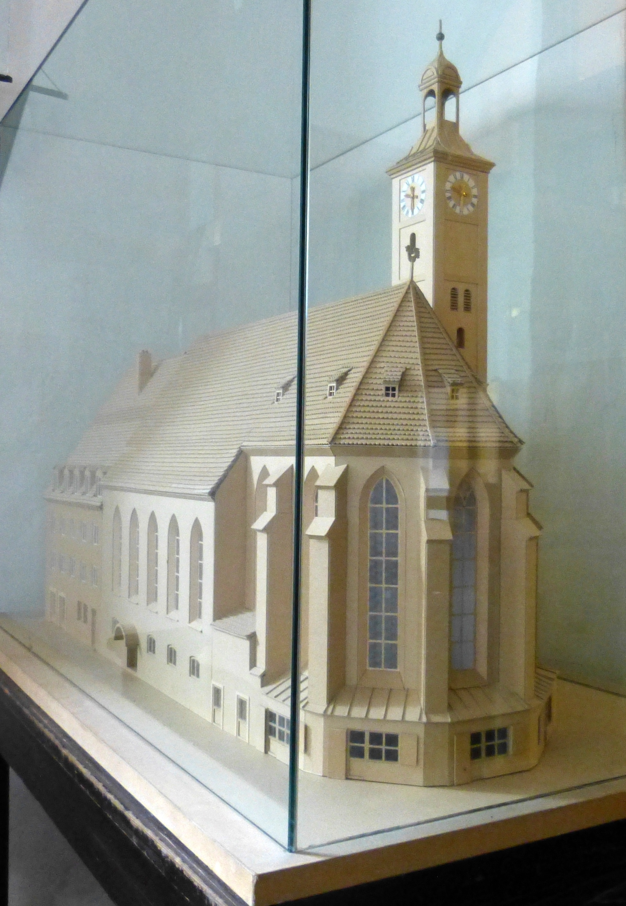 Augsburg, Modell der Kirche St. Jakob.